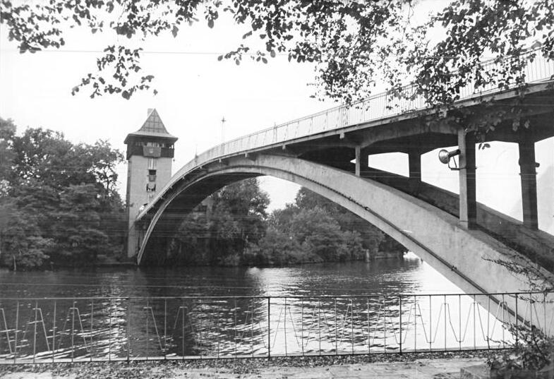 ADN-ZB-Uhlemann-26.9.85-Berlin: Jugendklub - Eine schön geschwungene Brücke verbindet die Insel der Jugend auf der Spree mit dem Festland. Der Kreisjugendklub des Berliner Stadtbezirkes Treptow hat in einem der Brückentürme seine Heimstatt gefunden. Besteht die Einrichtung auch erst gut ein Jahr, so haben sich die vielfältigen Veranstaltungen bereits herumgesprochen. Großes Interesse fanden vor allem das Inselfest und der 2. Rocksommer in Berlin in diesem Jahr - beides soll Tradition werden - bei den Jugendlichen.